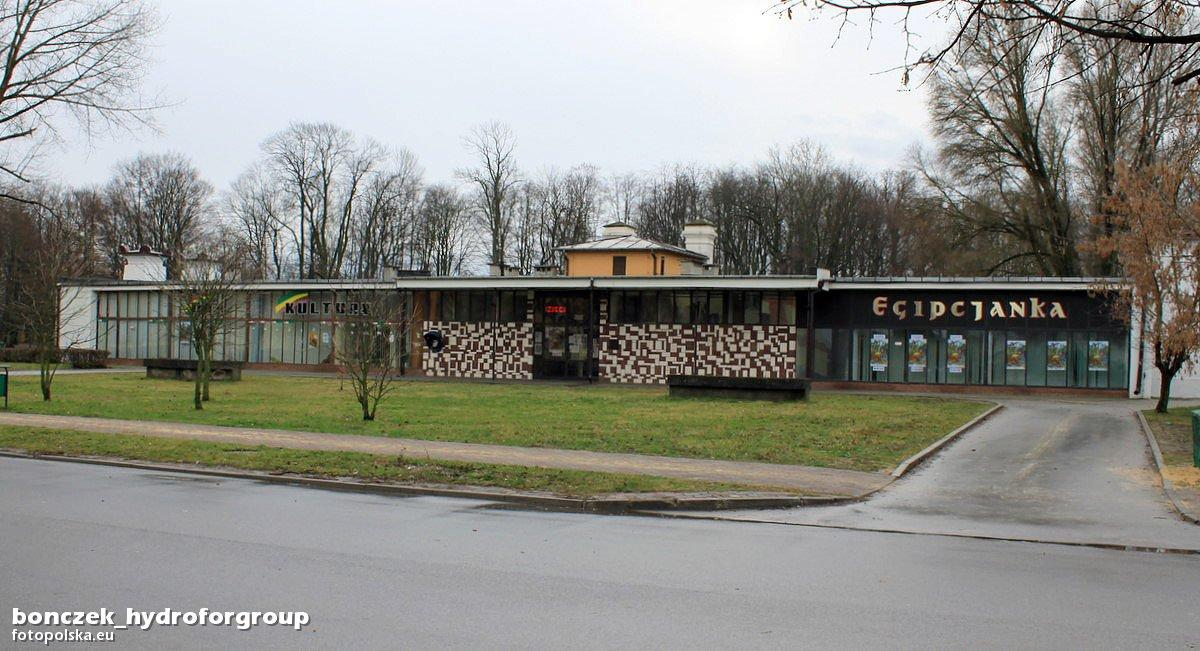 Od frontu